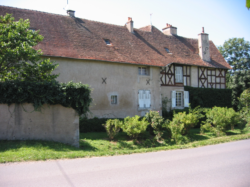 Jaligny-sur Besbre (France) - Le Couvent